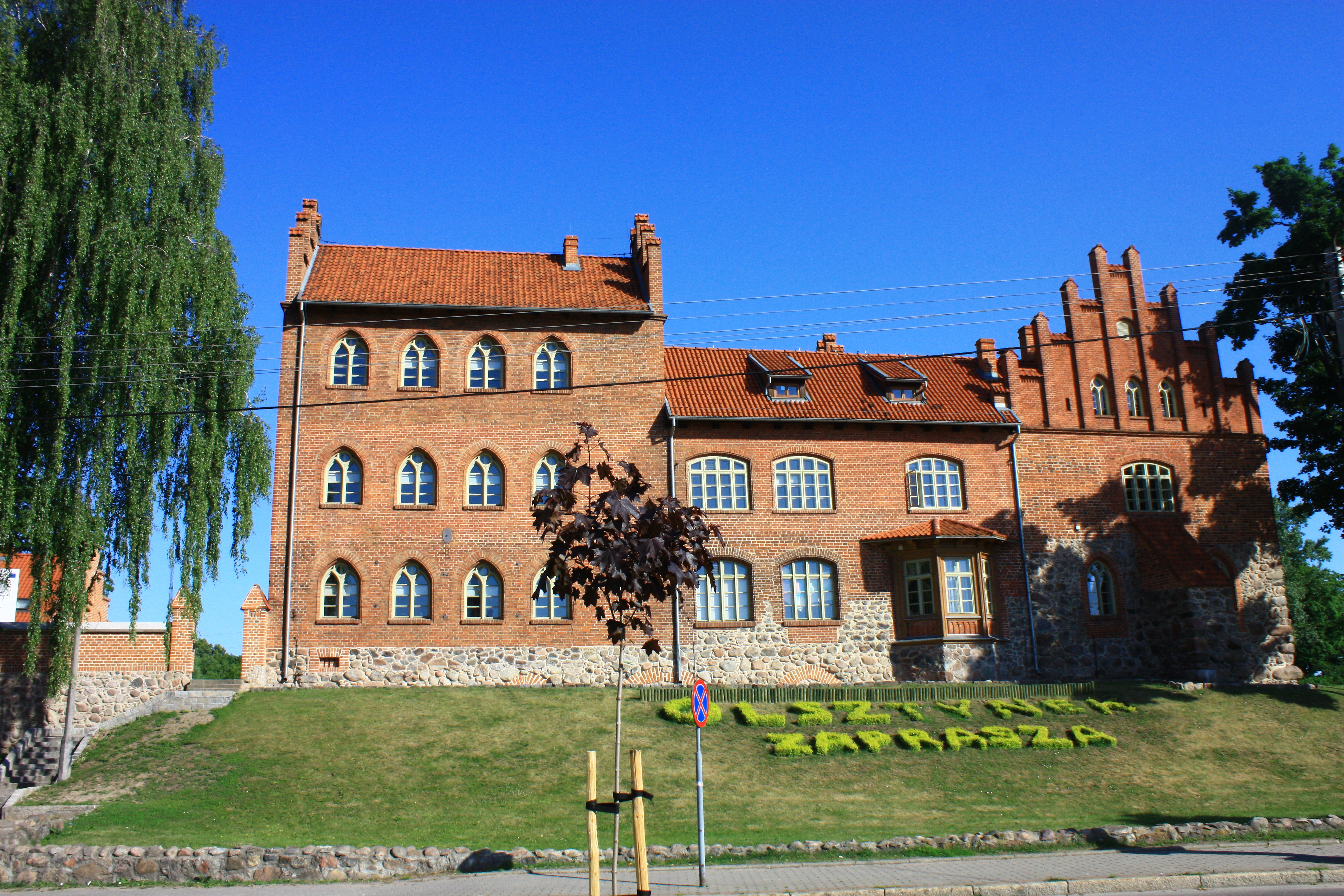 Olsztynek, zamek, ob. szkoła, 1 poł. XIV, XVII, XIX